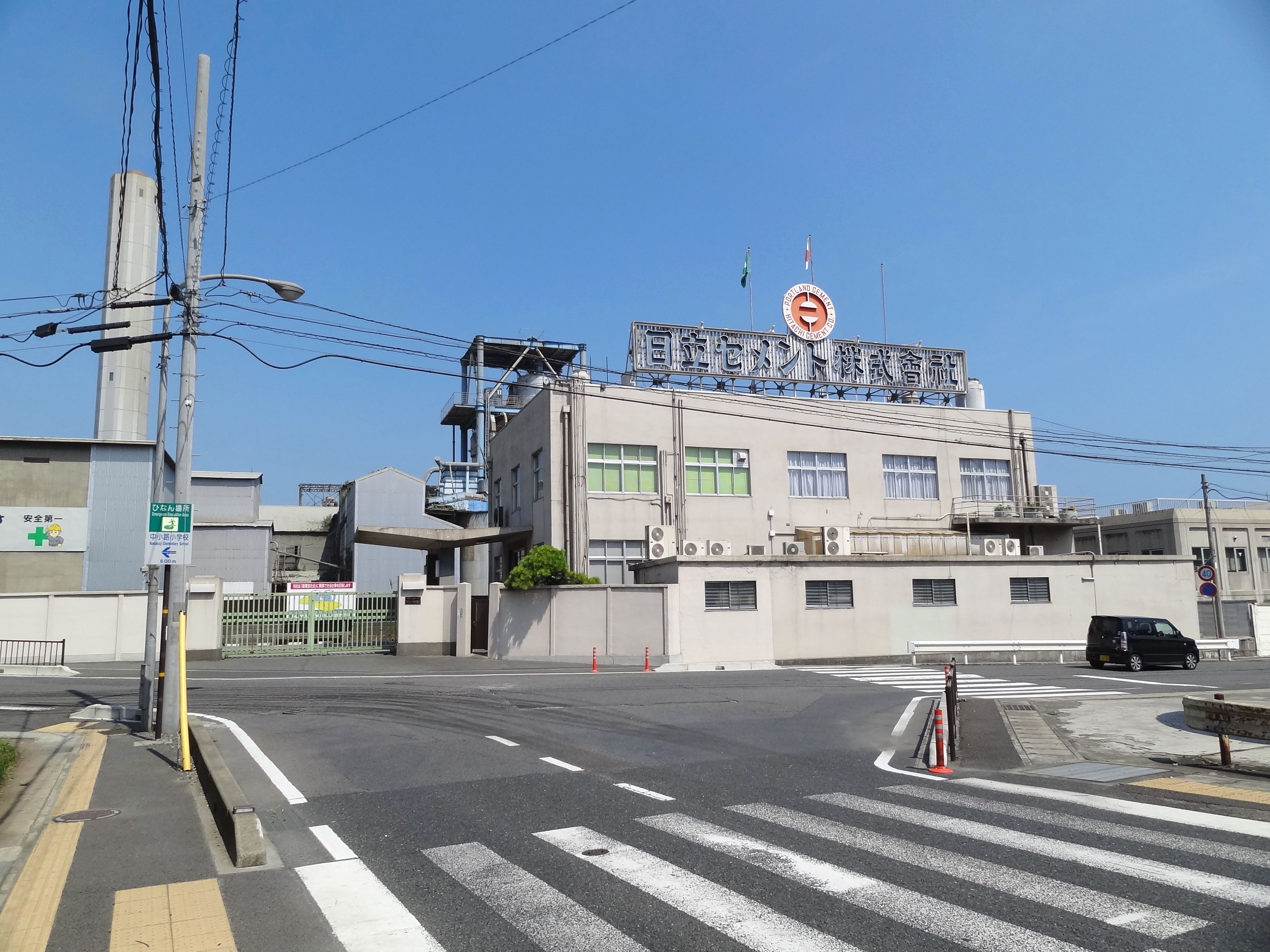 日立セメント本社